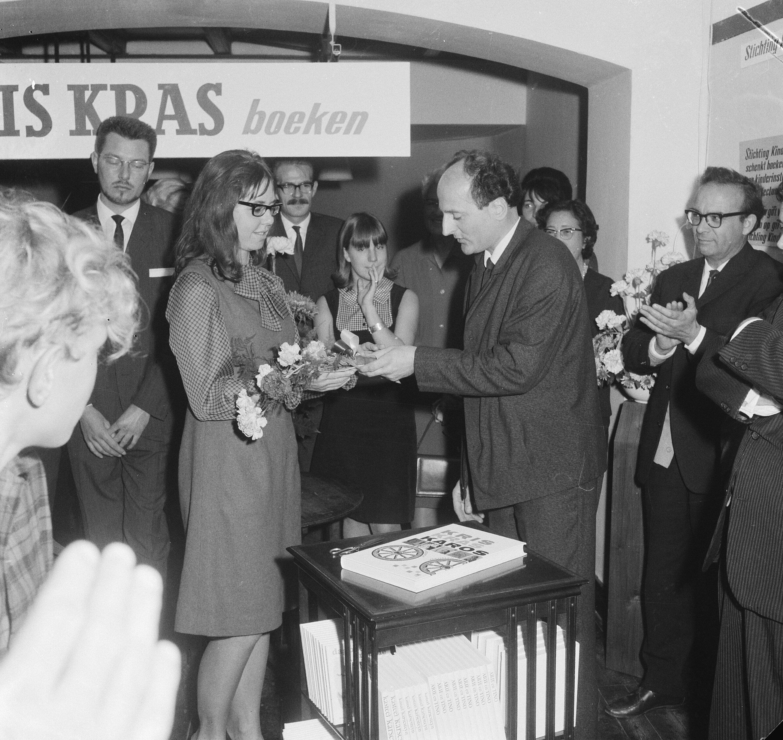 Collectie / Archief : Fotocollectie Anefo Reportage / Serie : [ onbekend ] Beschrijving : 10 jaar Kris Kras (jeugdblad), de prijswinnares ontvang prijs van de heer Vaarzon Datum : 29 oktober 1964 Trefwoorden : ontvangsten, prijzen Fotograaf : Gelderen, Hugo van / Anefo Auteursrechthebbende : Nationaal Archief Materiaalsoort : Negatief (zwart/wit) Nummer archiefinventaris : bekijk toegang 2.24.01.03 Bestanddeelnummer : 917-0746